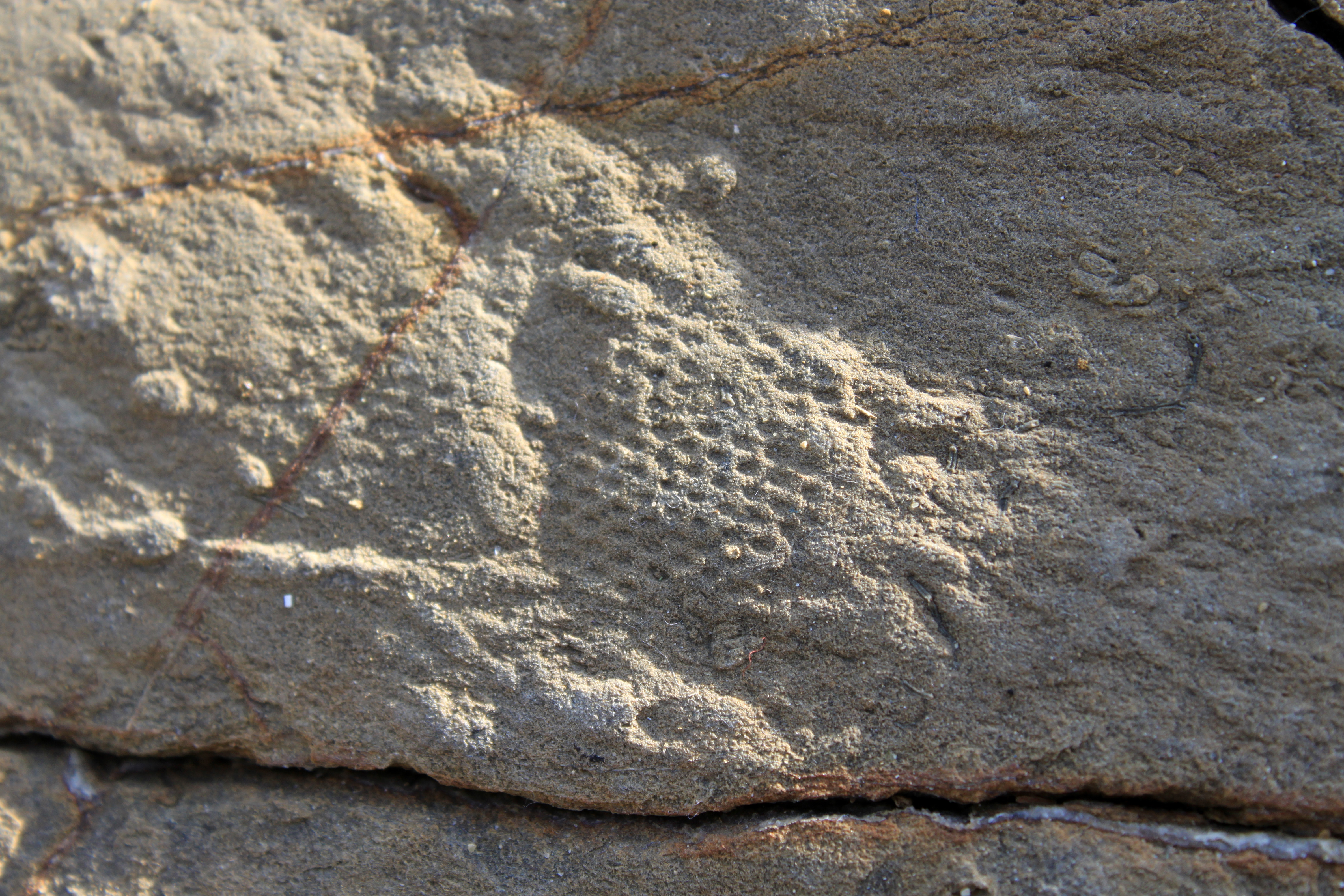 Paleodictyon, probablemente P. minimum en arenisca de los flyschs de la punta de San García. Complejos del Campo de Gibraltar, Unidad de Algeciras (Oligoceno-Mioceno). Algeciras, Andalucía, España.